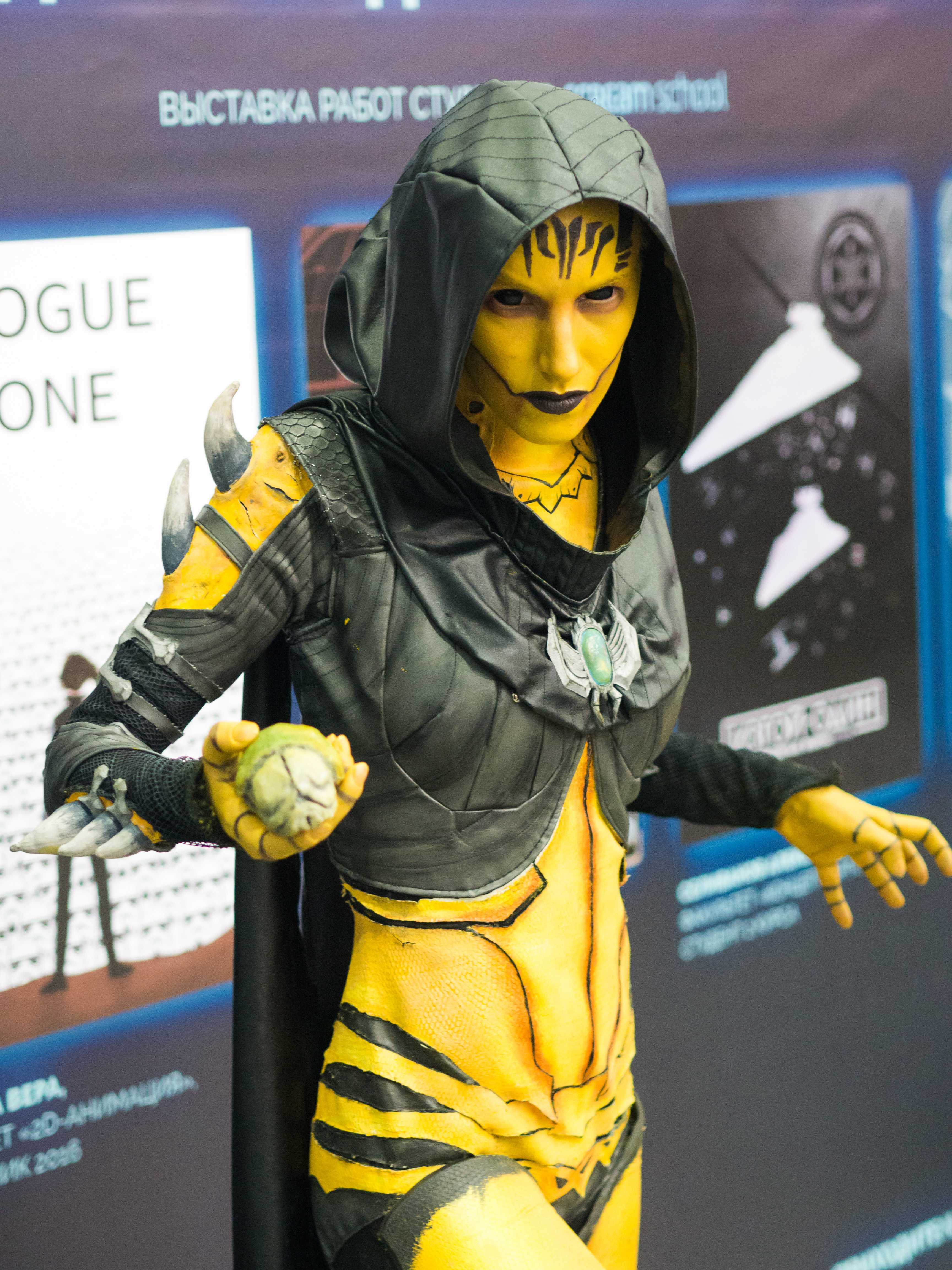 day 4